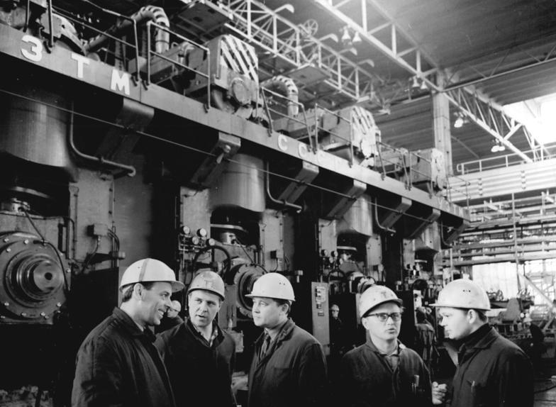 Eisenhüttenkombinat Ost, Kaltwalzwerk, sowjetische Ingenieure Zentralbild Link 22.4.69 Bezirk Frankfurt-Oder: Kaltwalzwerk im Eisenhüttenkombinat Ost Unser Foto zeigt das Quarto Tandem - 4 Walzenständer - das Herzstück des gesamten Kaltwalzwerkes. Dieses mit Hilfe der Sowjetunion erbaute Kaltwalzwerk wird in Zusammenarbeit mit den Ingenieuren der SU und den DDR-Fachleuten mit Erfolg weitergeführt. (v.r.n.l.) Die Ingenieure Alexander Schaparny (SU), Erwin Saffer, Sergejw (SU), Siegfried Slobinski und der Leiter der sowjetischen Gruppe Boris Draljuk.